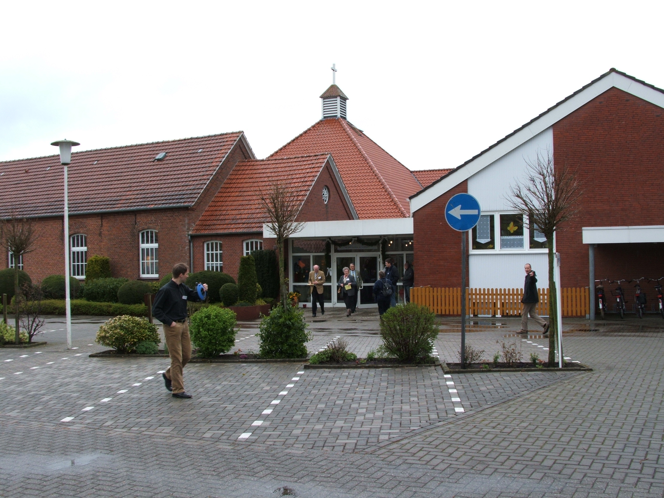 Kirche der Baptistengemeinde Ihren